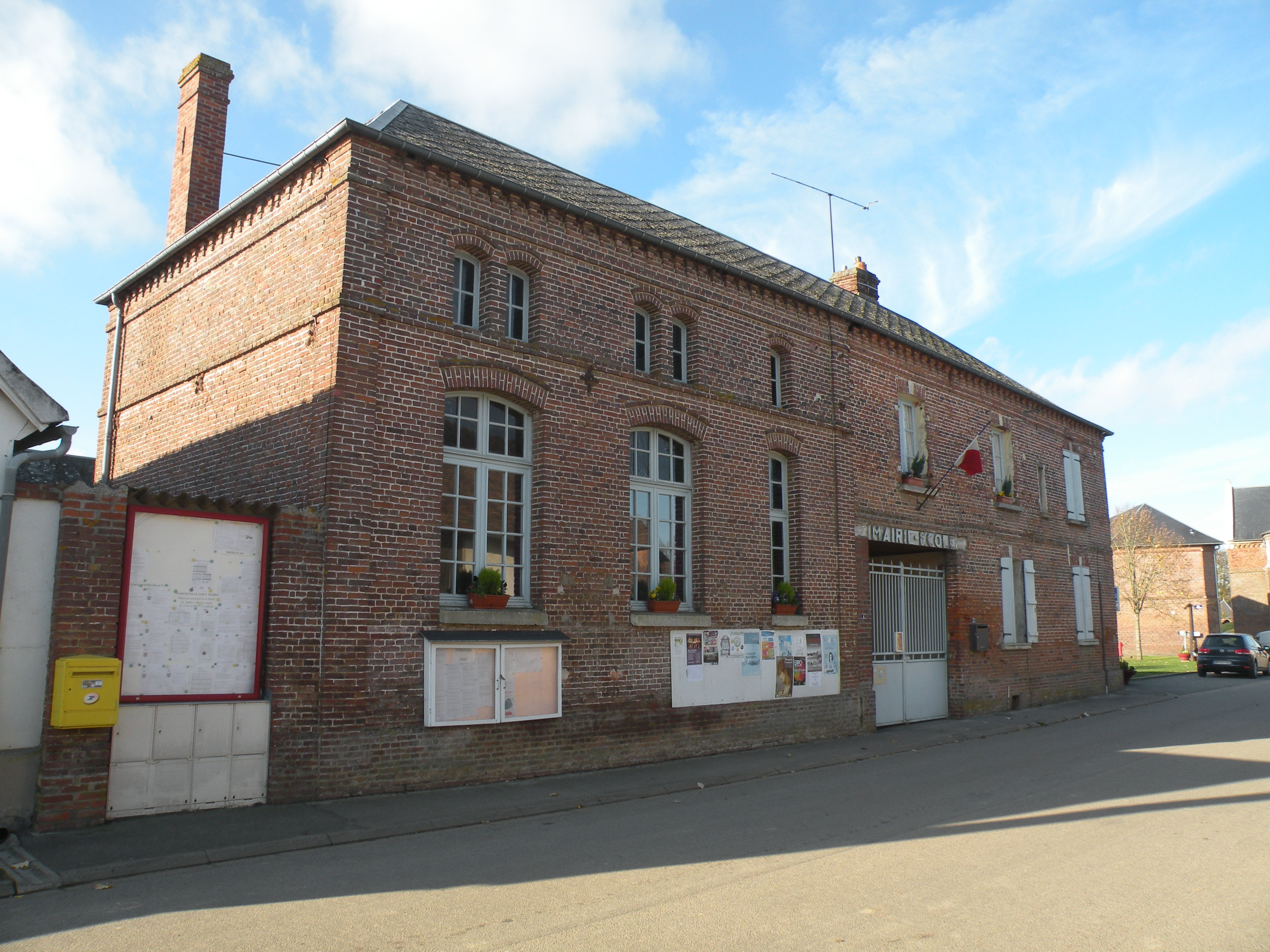 Maisoncelle-Saint-Pierre